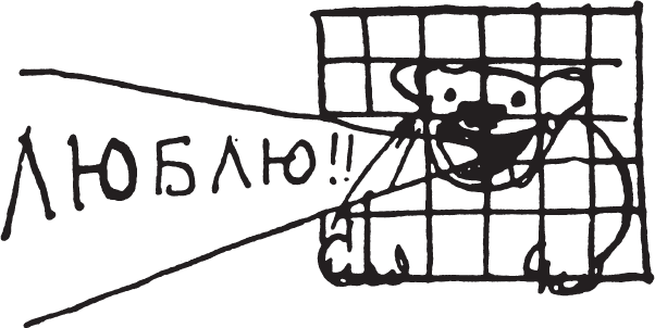 Рисунок Маяковского, адресованный Лиле Брик